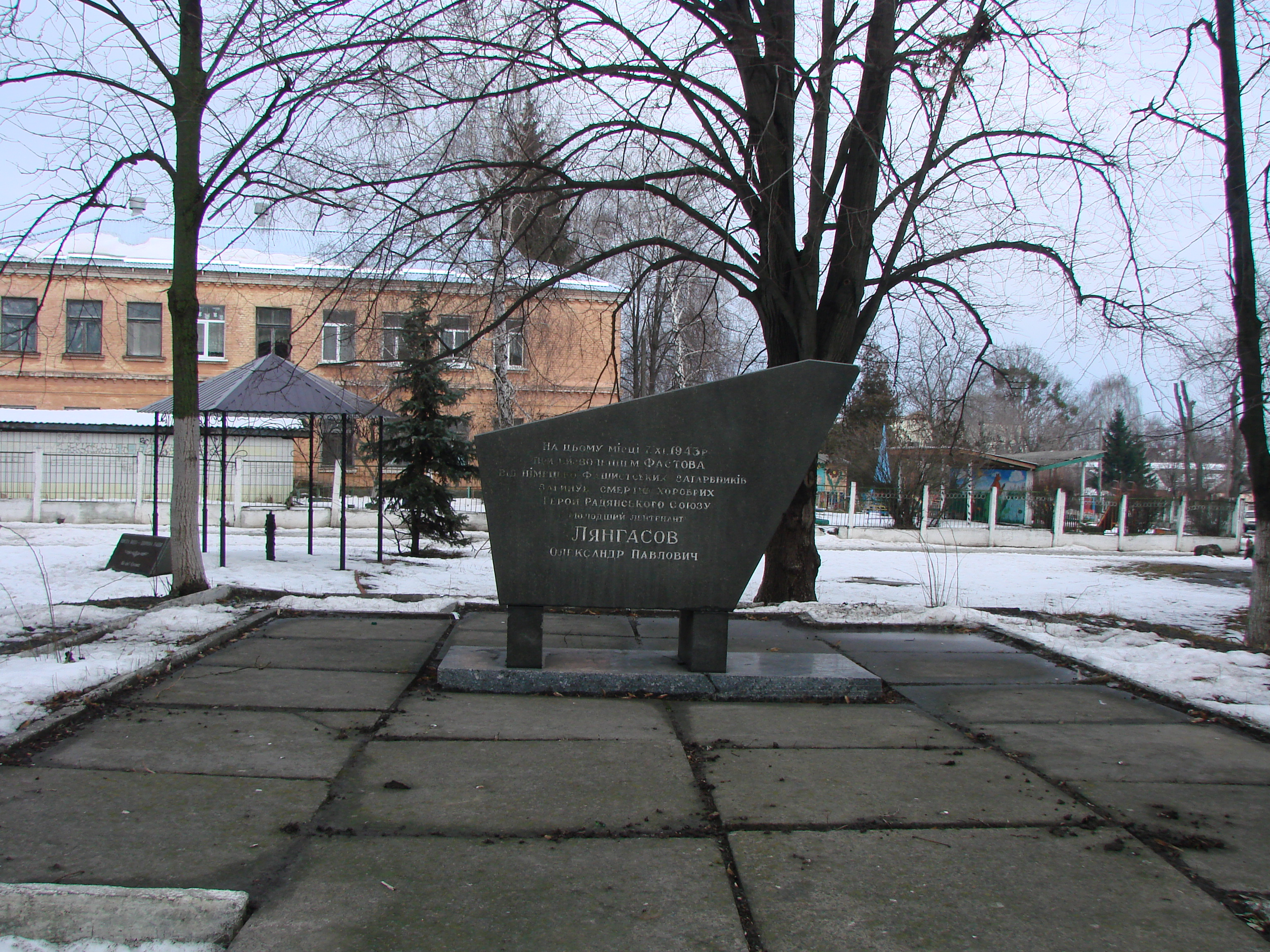 Пам'ятний знак на місці загибелі Героя Радянського Союзу Лянгасова А.П., Фастів, вул. Кірова, 1 (Привокзальна площа)